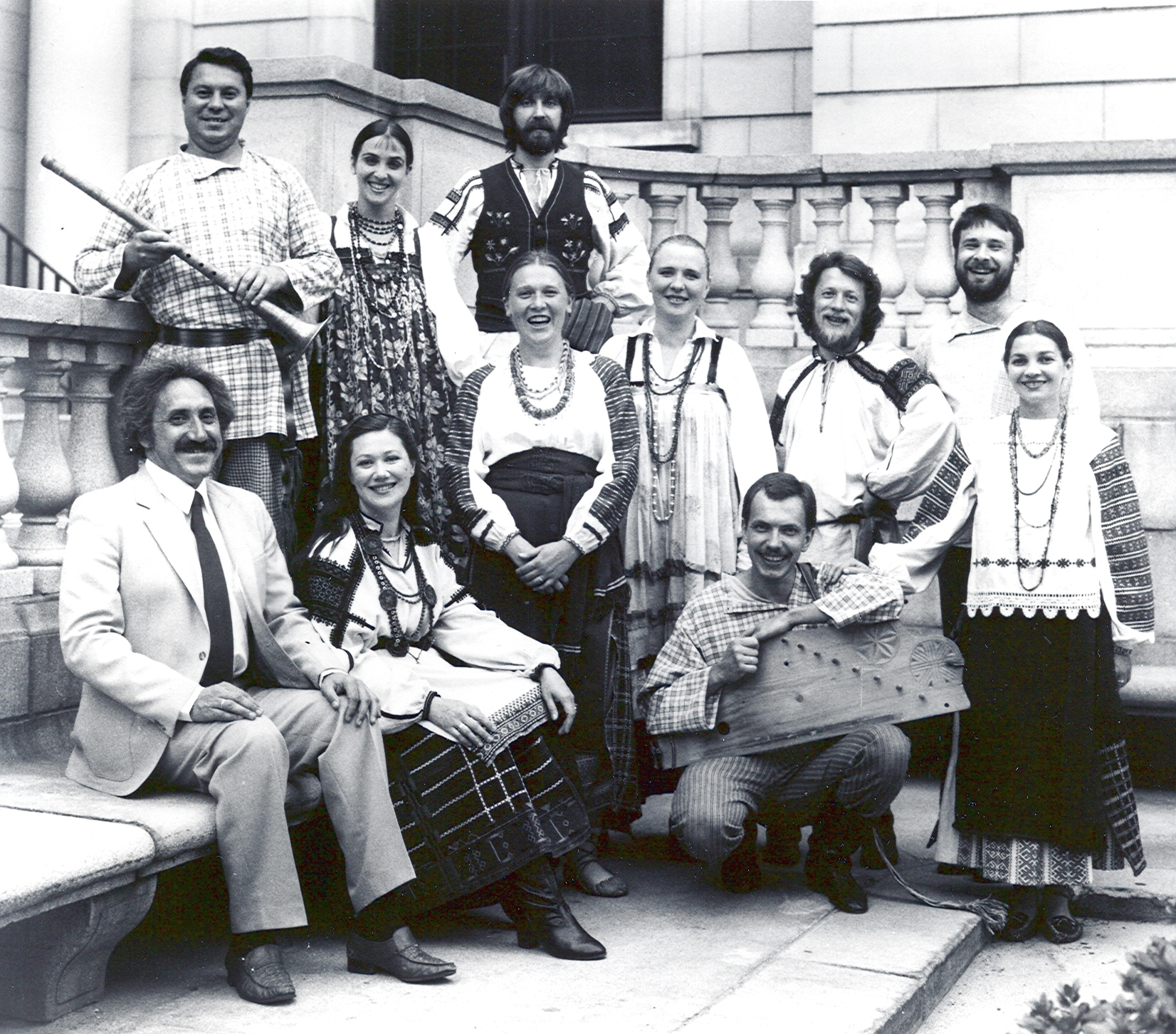 фото